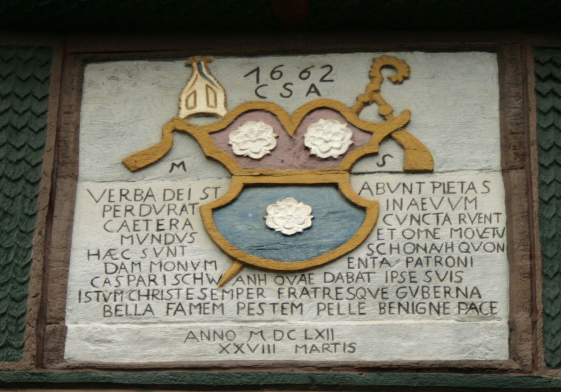 Wappen des Abts Caspar Schwan am ehemaligen Hof des Klosters Schönau in Elz, Landkreis Limburg-Weilburg, Hessen, Deutschland